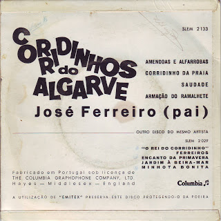 Contra capa do disco de José Ferreiro de 45 rotações,gravado em 1959